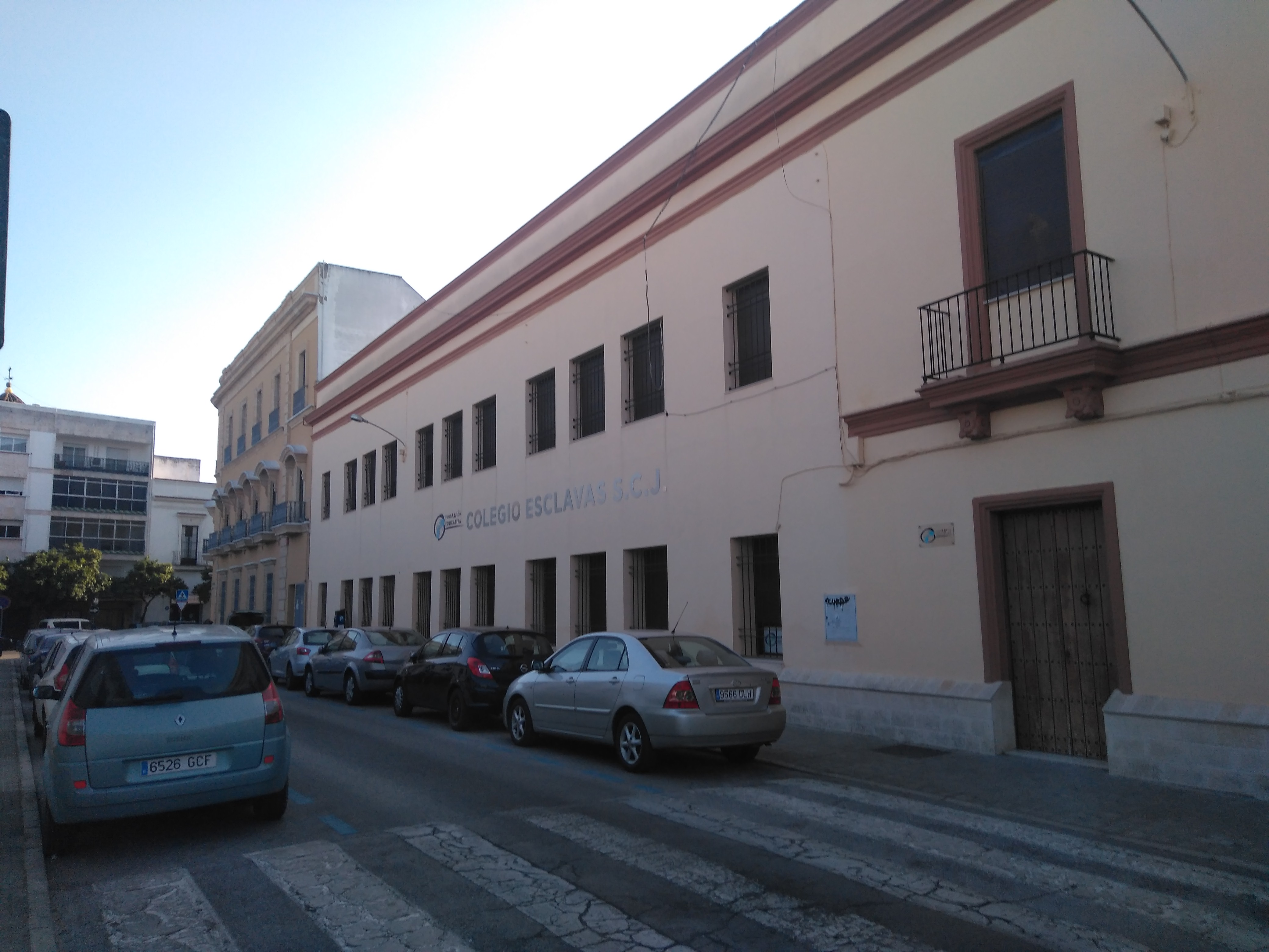 Colegio de Las Esclavas del Sagrado Corazón de Jesús (ACI) en Jerez de la Frontera (España)